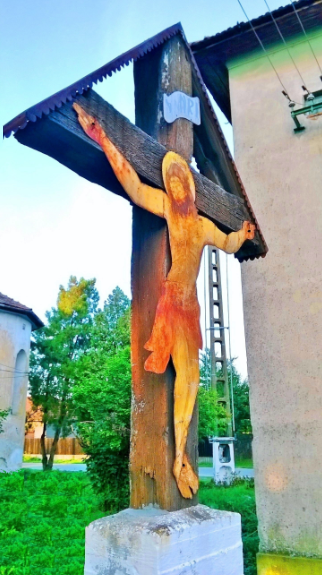 Crucea cu Domnul Isus